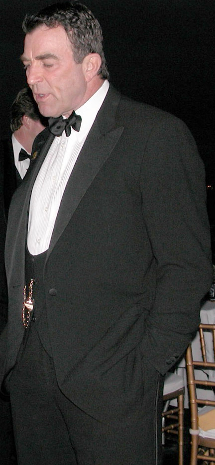 Tom Selleck